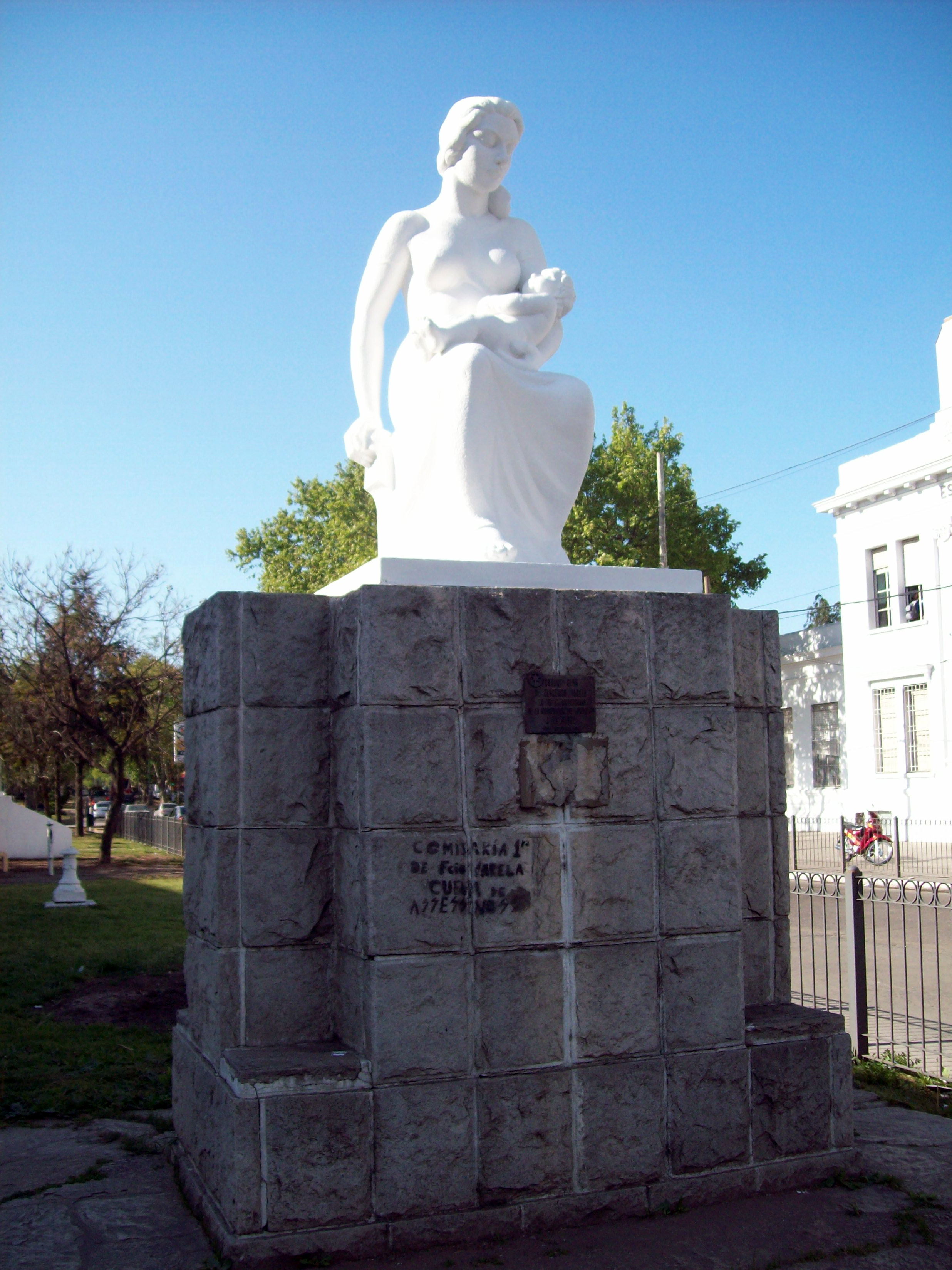 Monumento a la madre (inaugurado en 1957) en Avenida San Martín, Florencio Varela, Buenos Aires, Argentina.